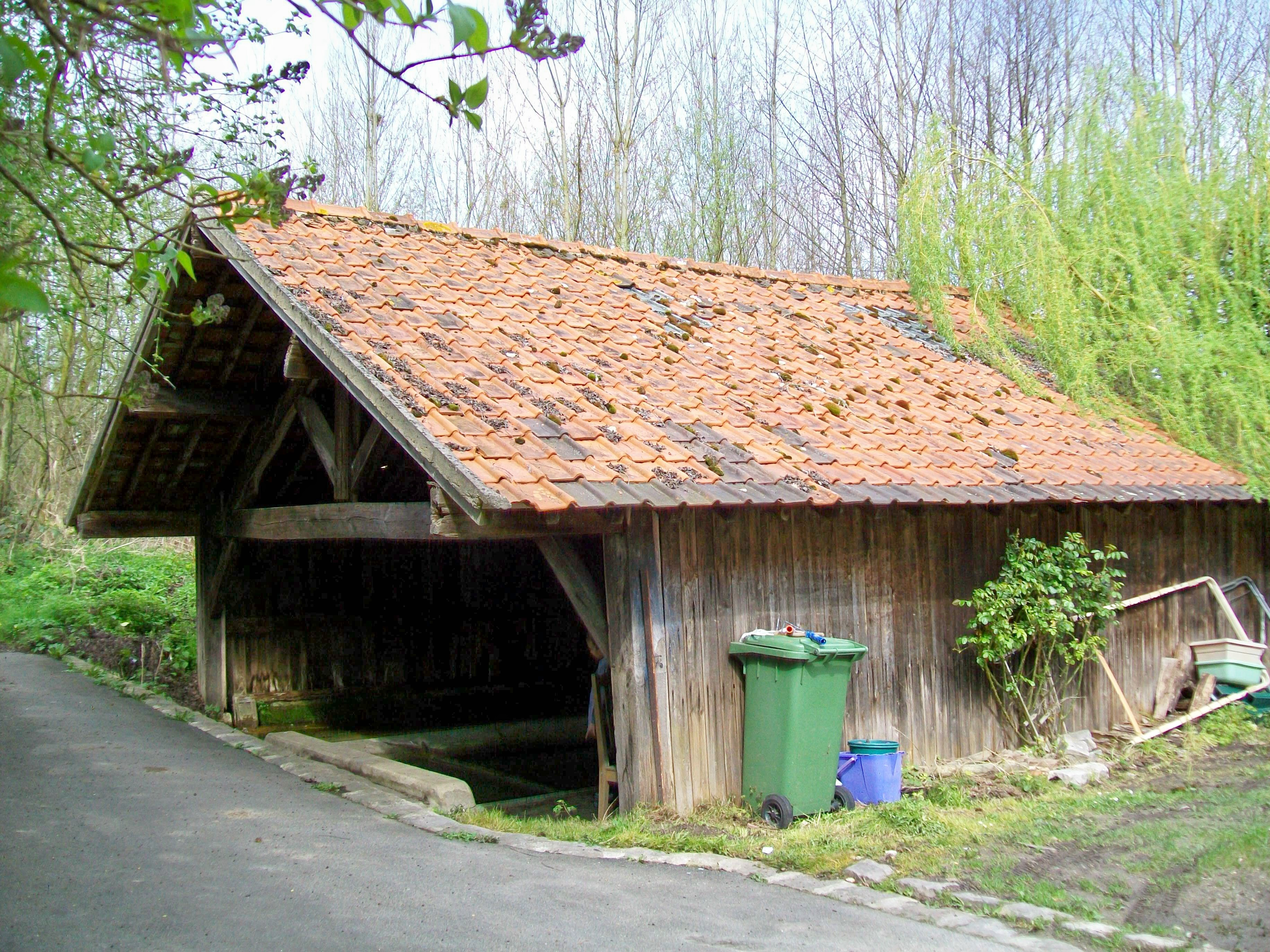 Le lavoir de Lassy (95), au bout de la ruelle du lavoir.